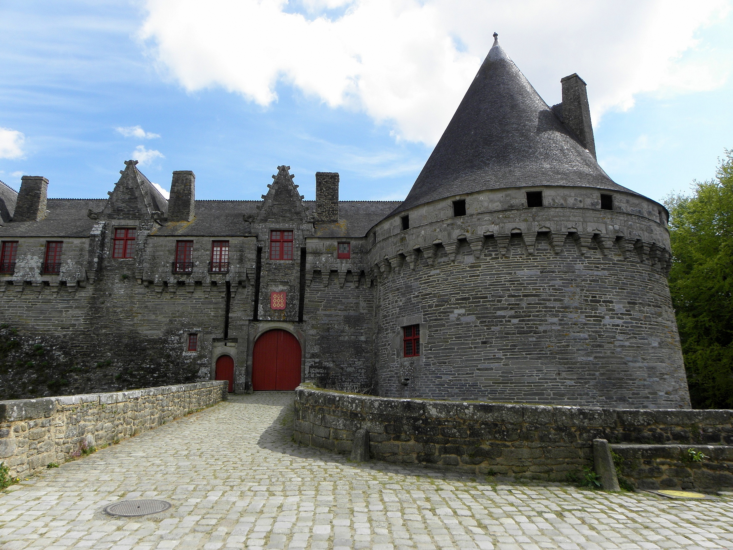 Château des Rohan à Pontivy (56). Façade ouest. .